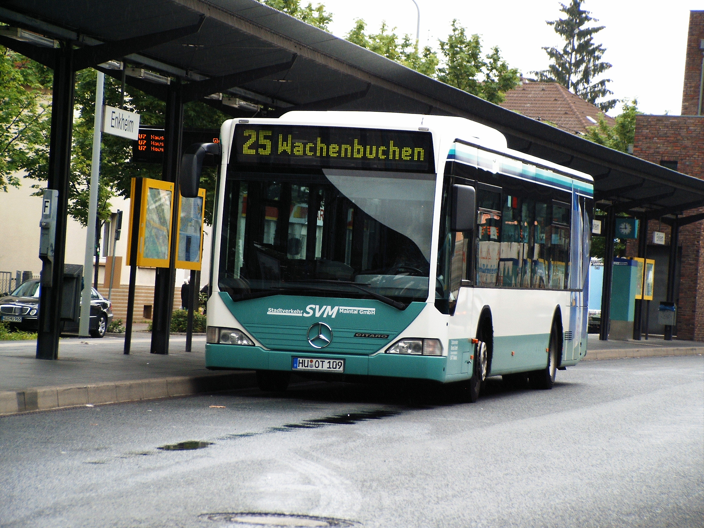 Buslinie 25 der SVM am Endbahnhof in Enkheim.